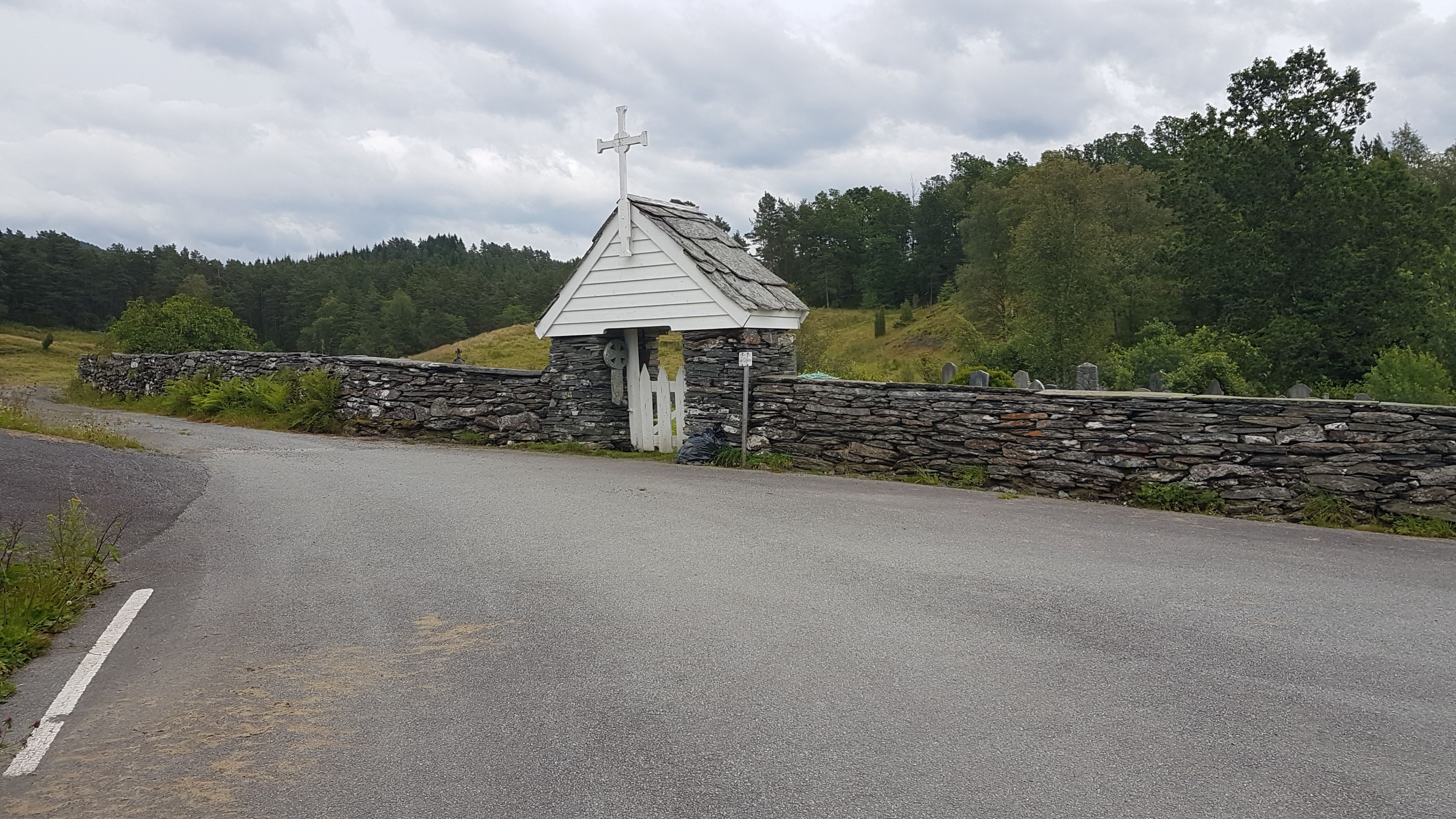 Varaldsøy kirkested, Kvinnherad kommune. Foto: Roger Grimelid. Fra Riksantikvarens Kulturminnesøk.